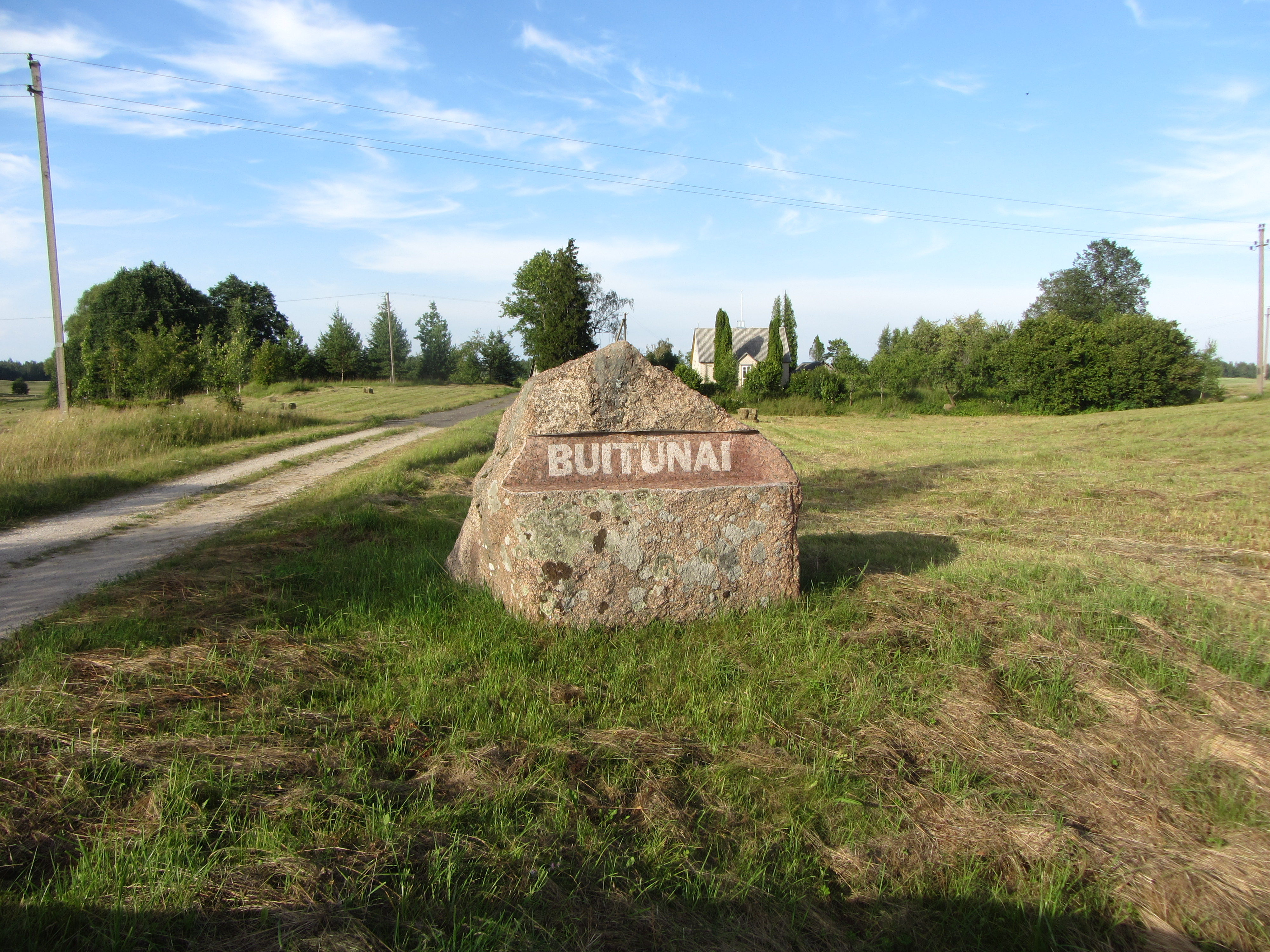 Kuktiškių sen., Lithuania